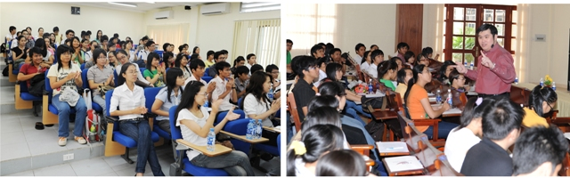 Giới thiệu chương trình đặc biệt